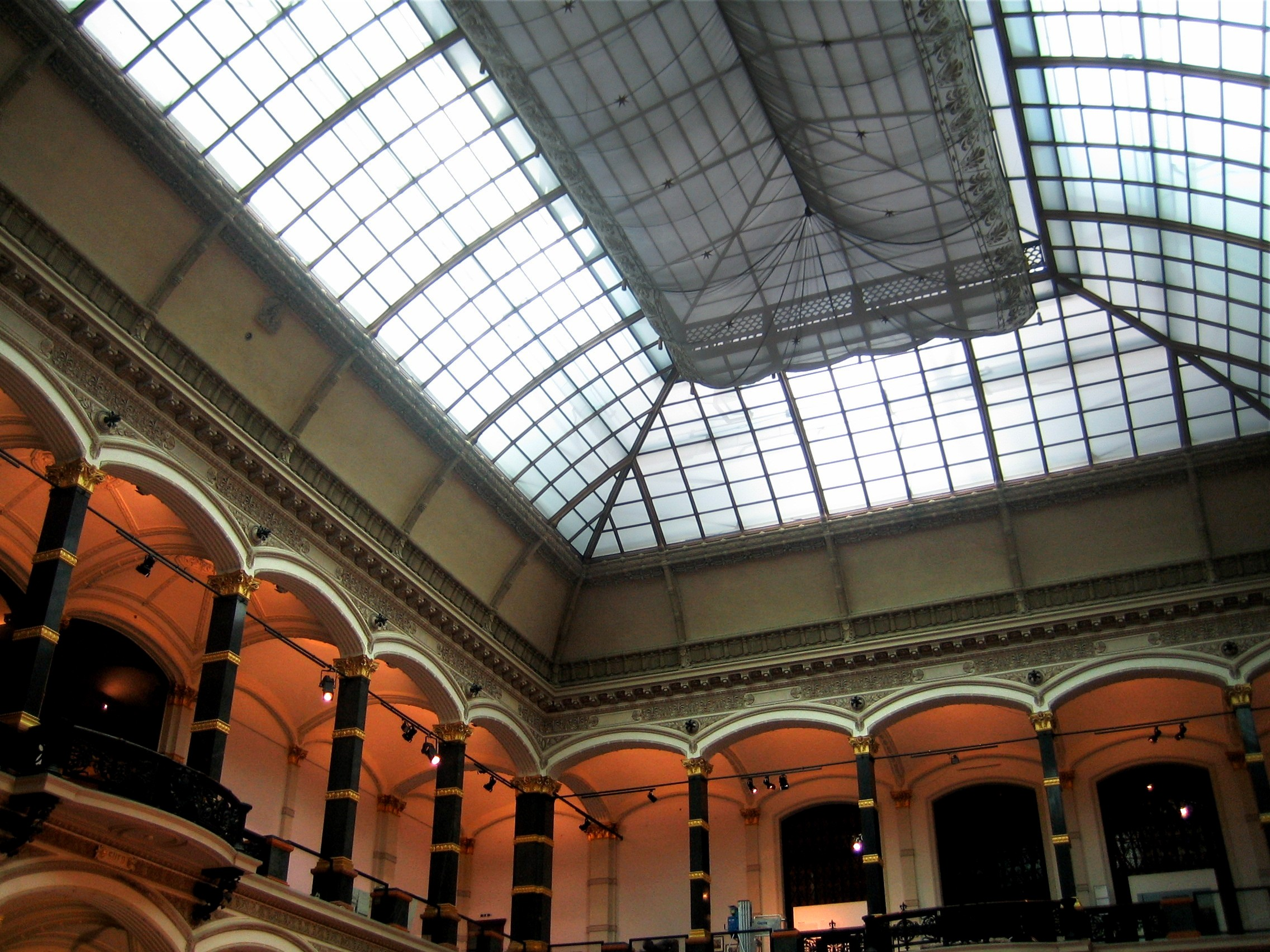 Martin-Gropius-Bau in Berlin Kreuzberg, Niederkirchnerstraße. Erbaut als Kunstgewerbemuseum, heute als Ausstellungsgebäude genutzt. Der Lichthof im Zentrum des Gebäudes. Teilansicht.